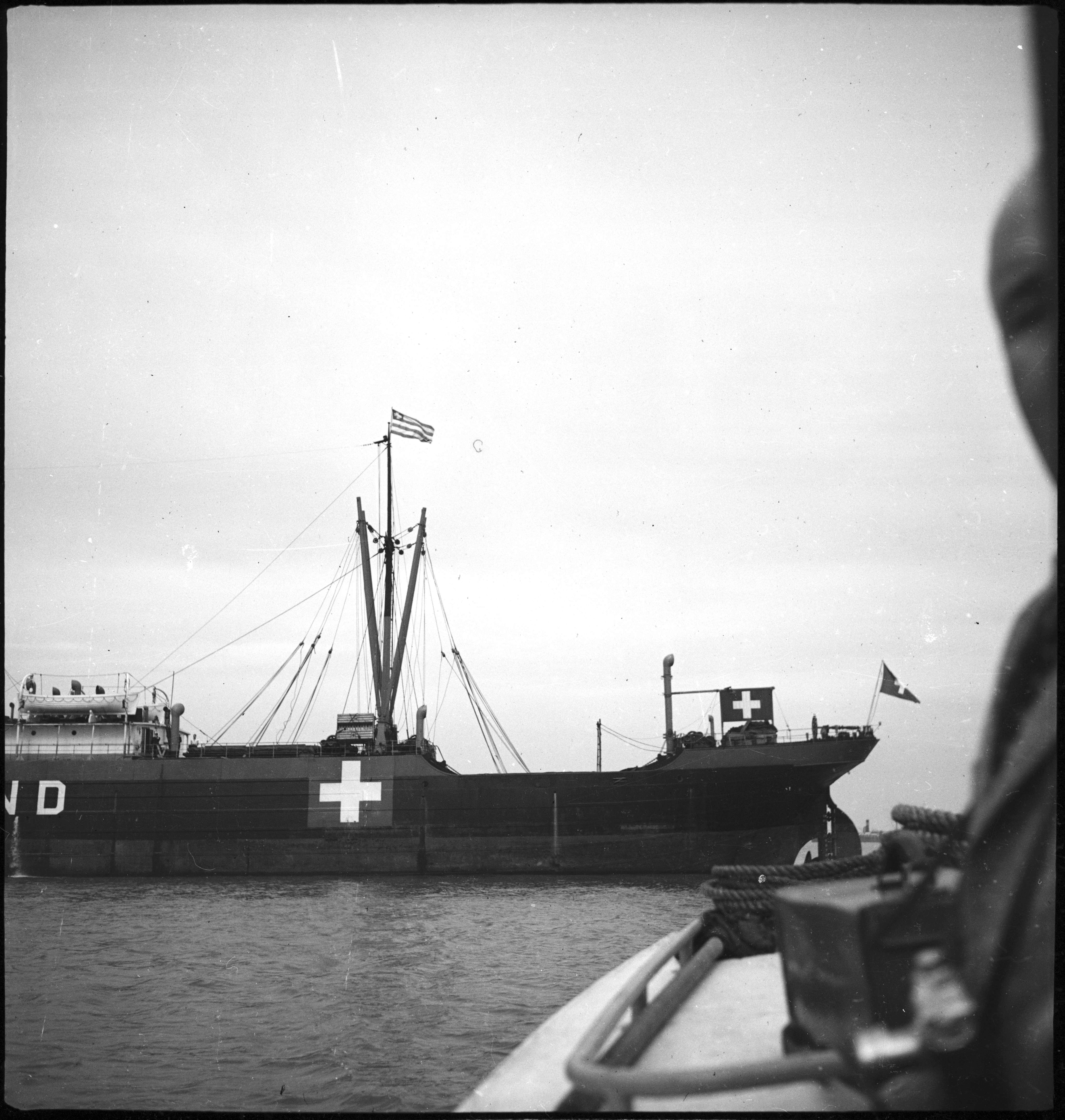 Portugal, Lissabon (Lisboa): Schiff Calanda; Der hintere Teil eines Schiffes mit Schweizer und Griechischer Flagge